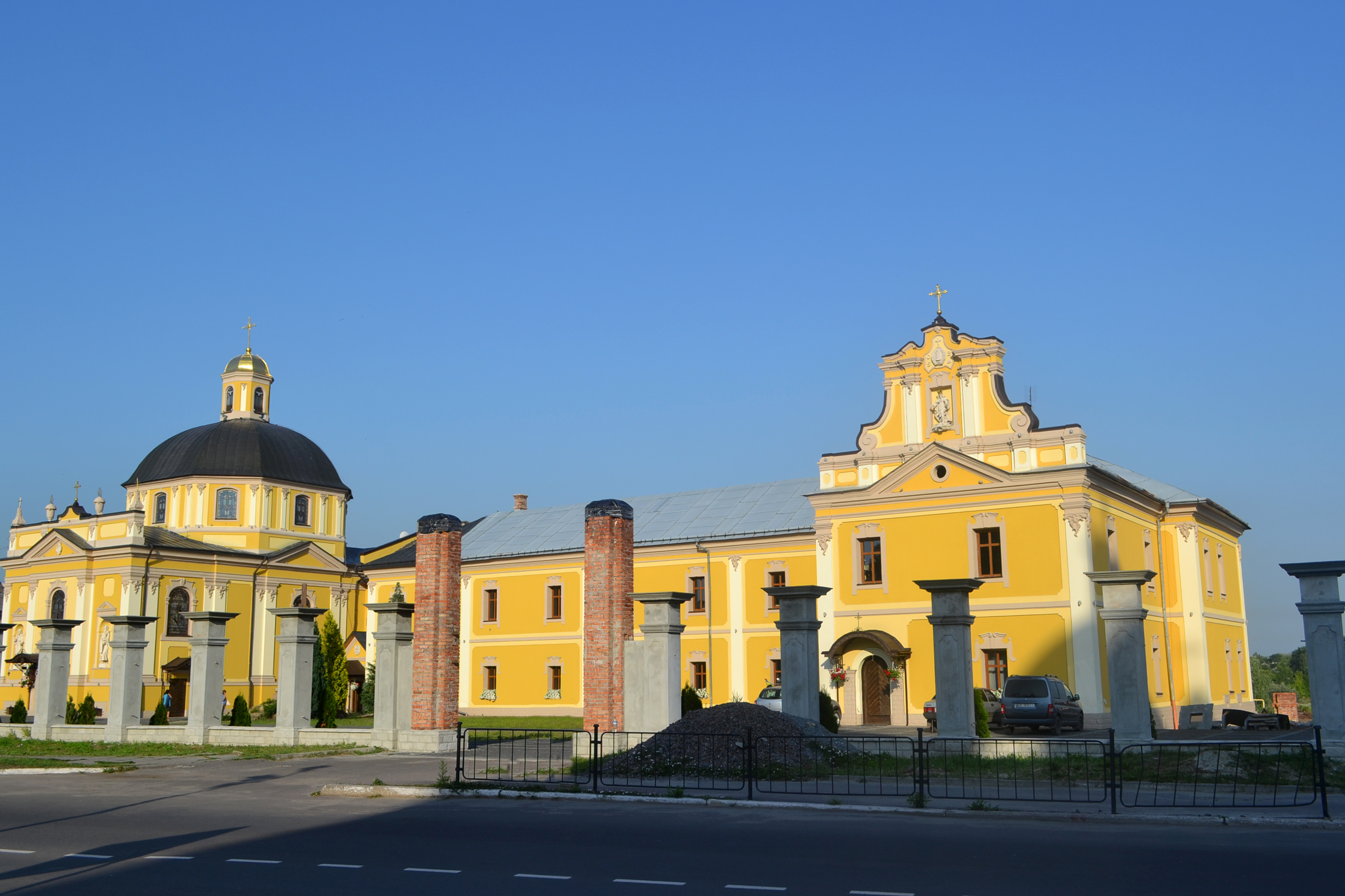 Церква Св.Юрія (мур.), Червоноград, вул.Б.Хмельницького, 21